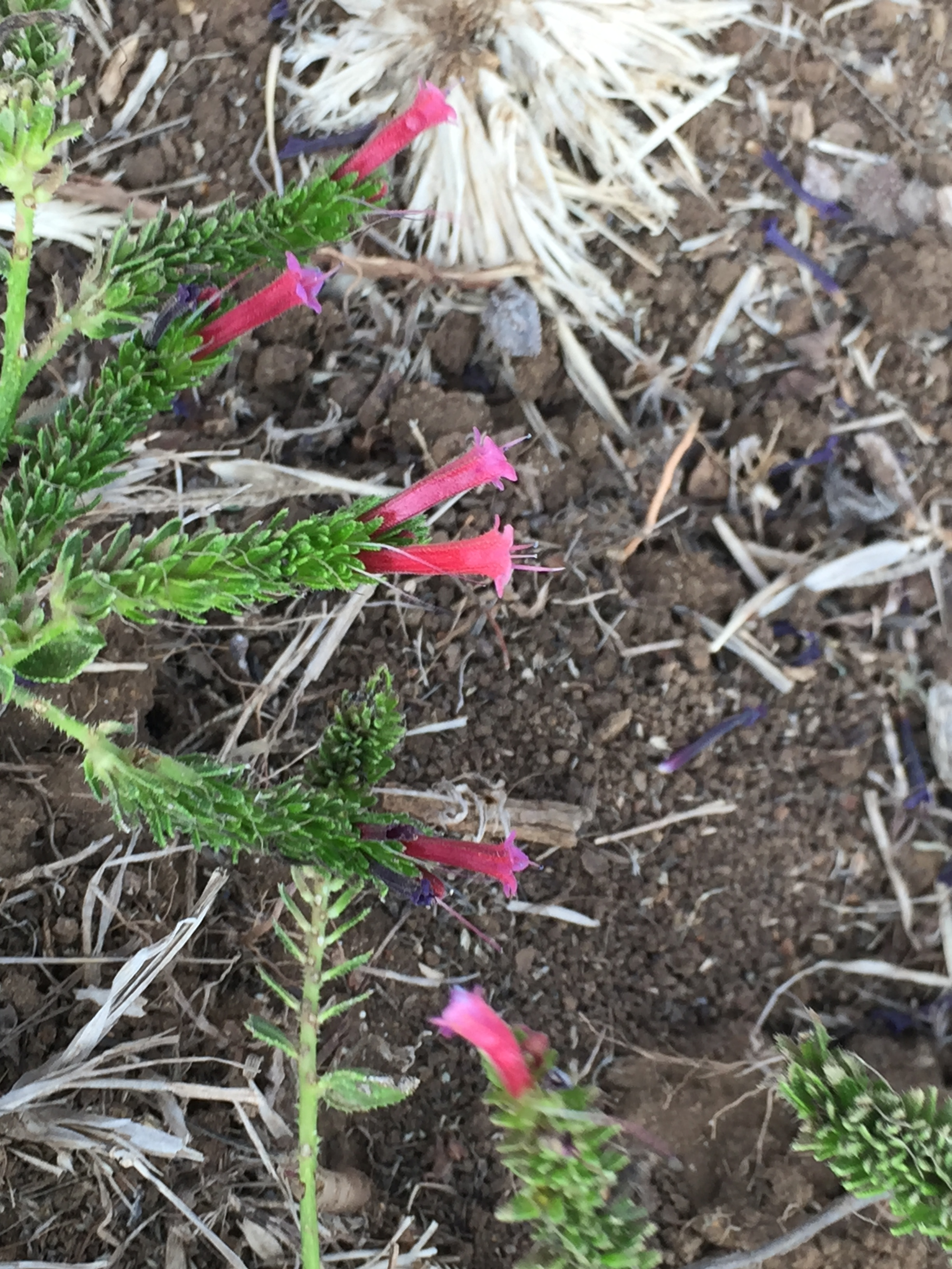 Fiori di echium stenosiphon.